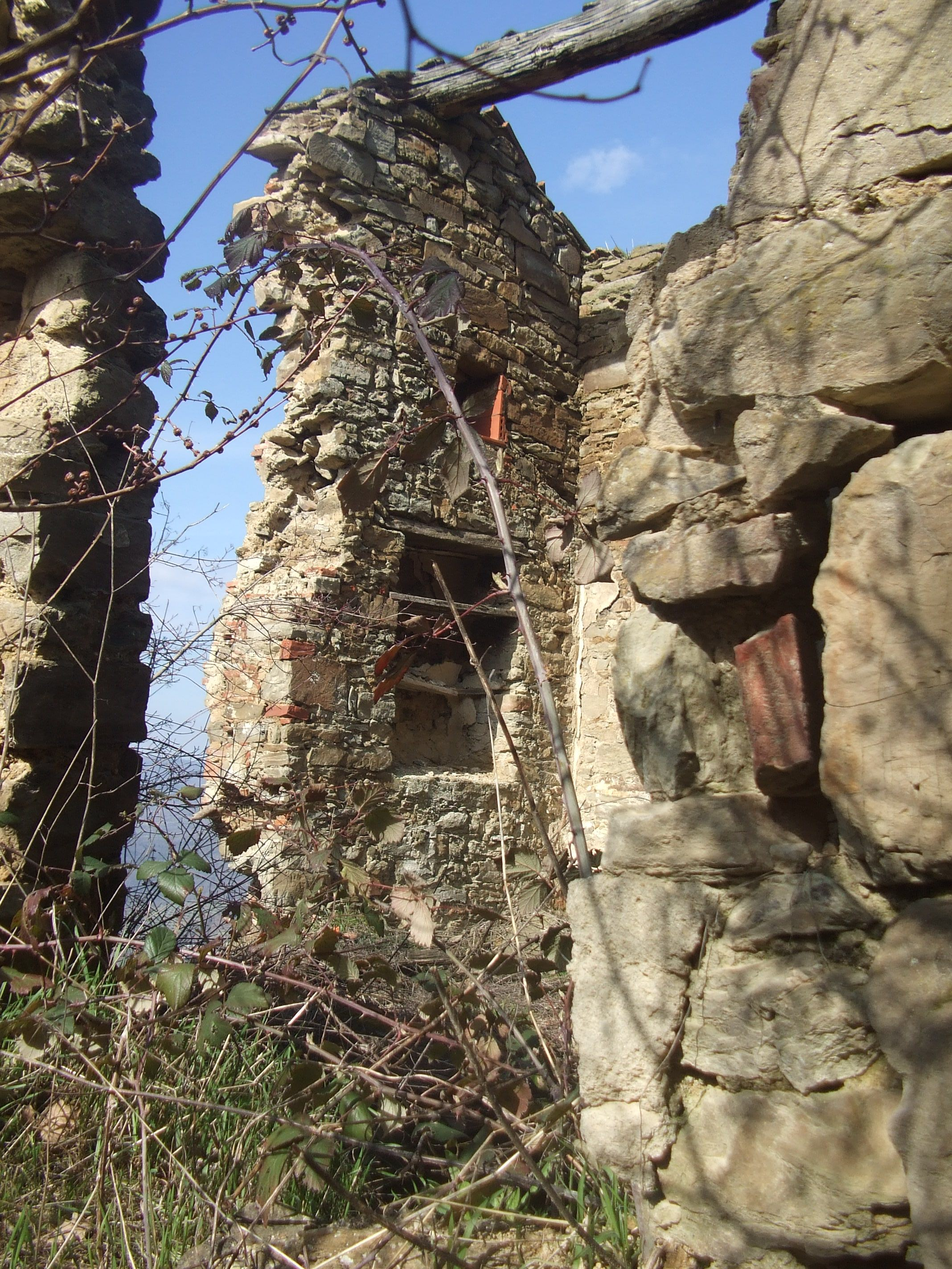 Ca le Rolle